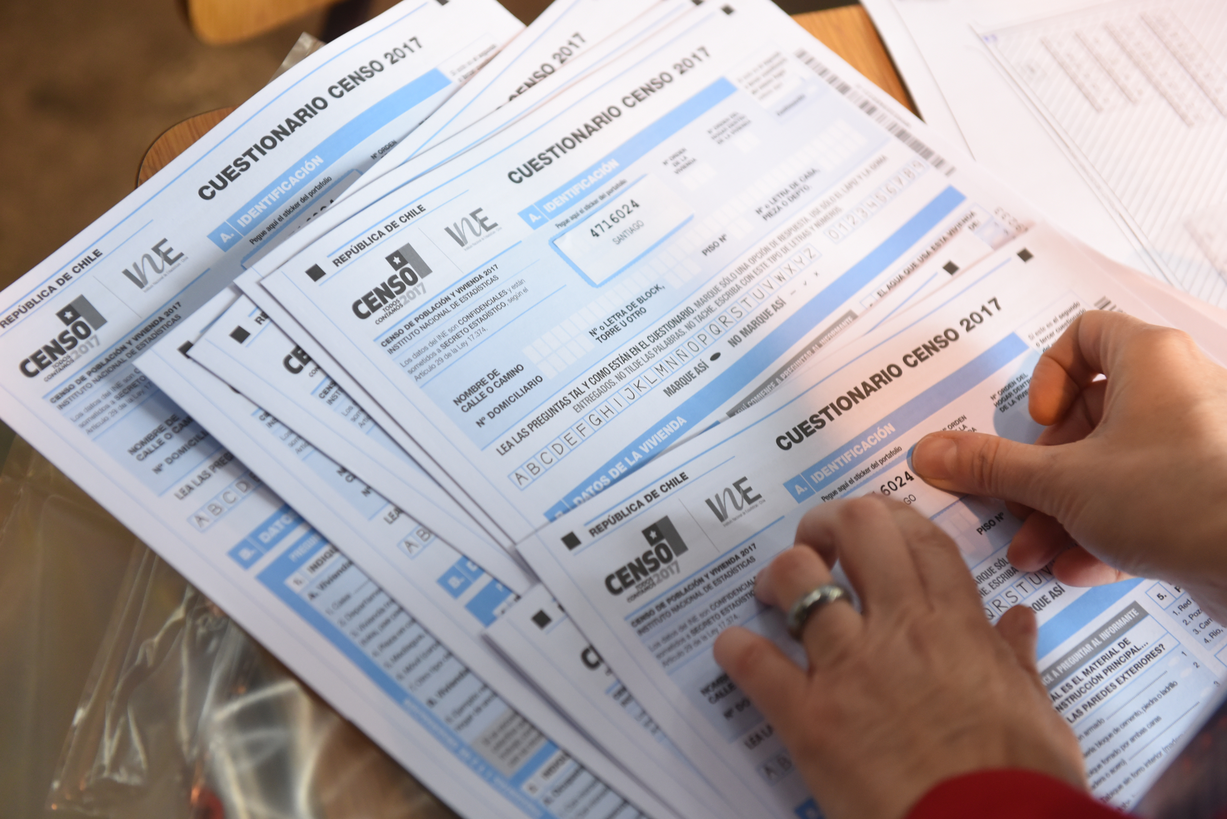 19 Abril 2017, Ministra Paula Narváez en vocería y luego se dirige a realizar censo en la comuna de Santiago.